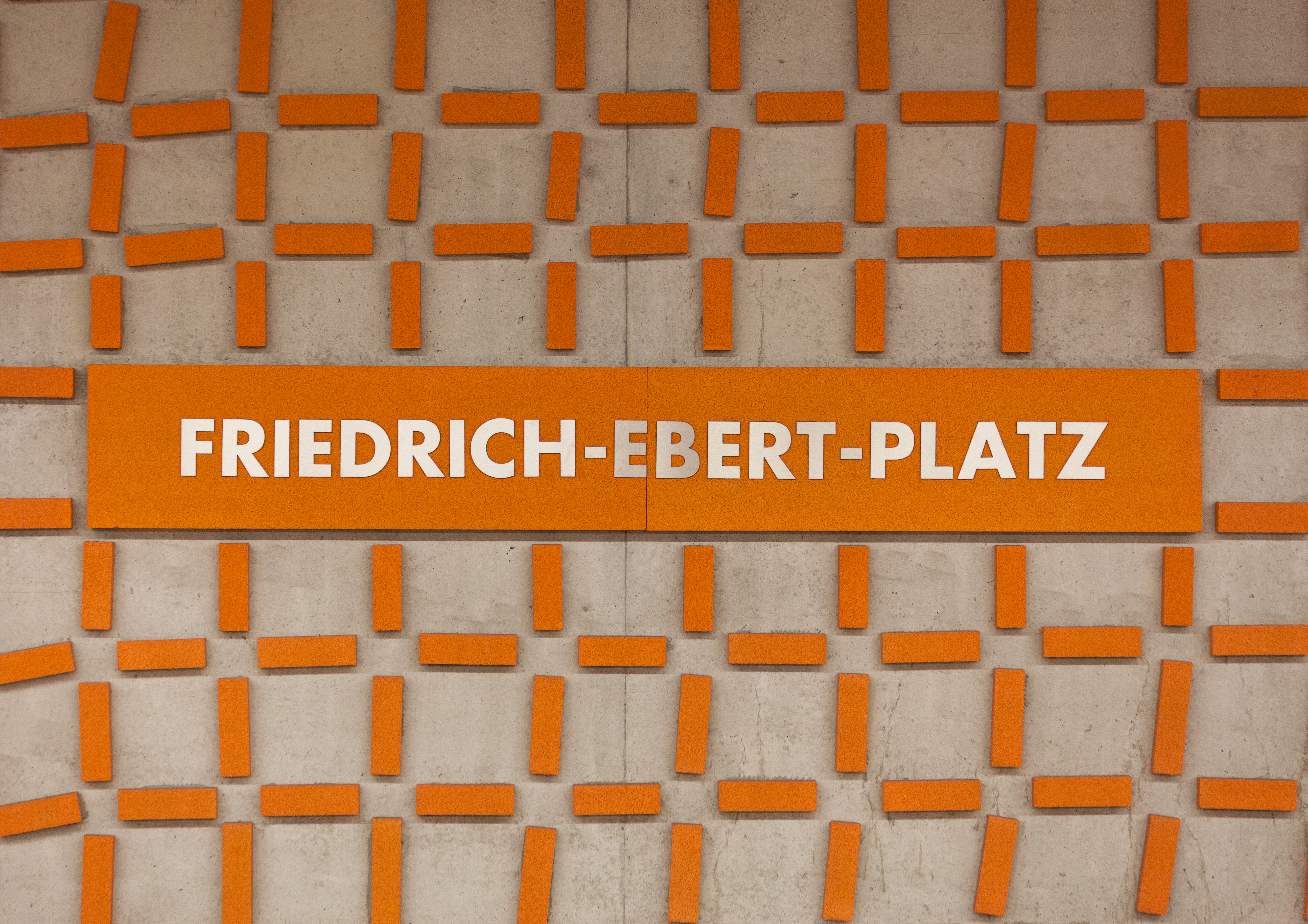 Haltestellenschild des U-Bahnhofs Friedrich-Ebert-Platz in Nürnberg.